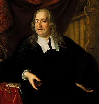 Portrait: Olaus Rudbeckius pere (Sr)